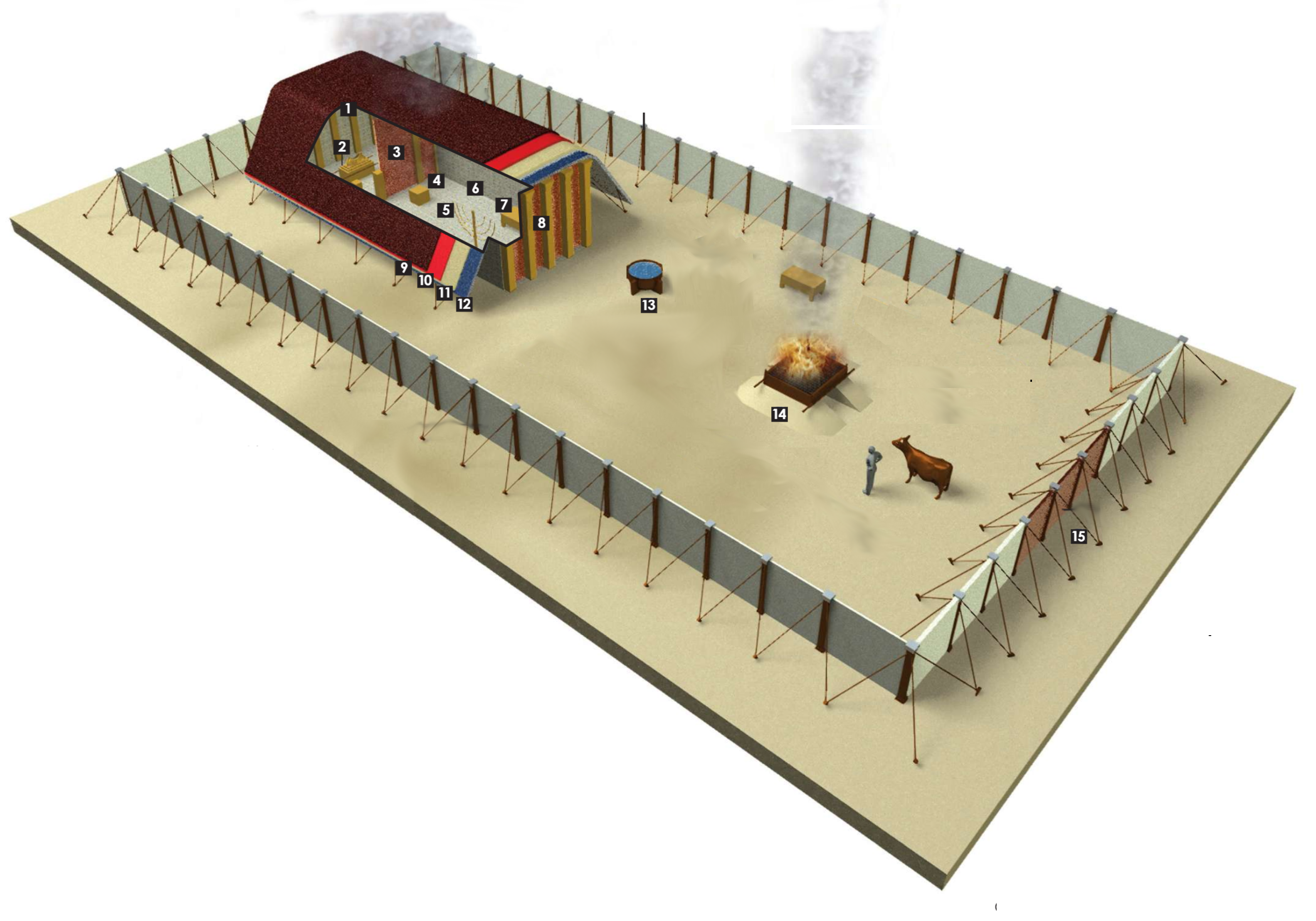 Tabernakel